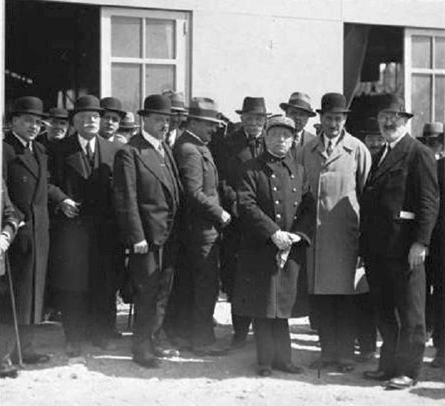 Etienne Billières (1er à G.) et Paul Feuga (2ème en partant de la droite) au concours agricole de Toulouse en 1934, en présence du préfet Fourcade (en tenue)